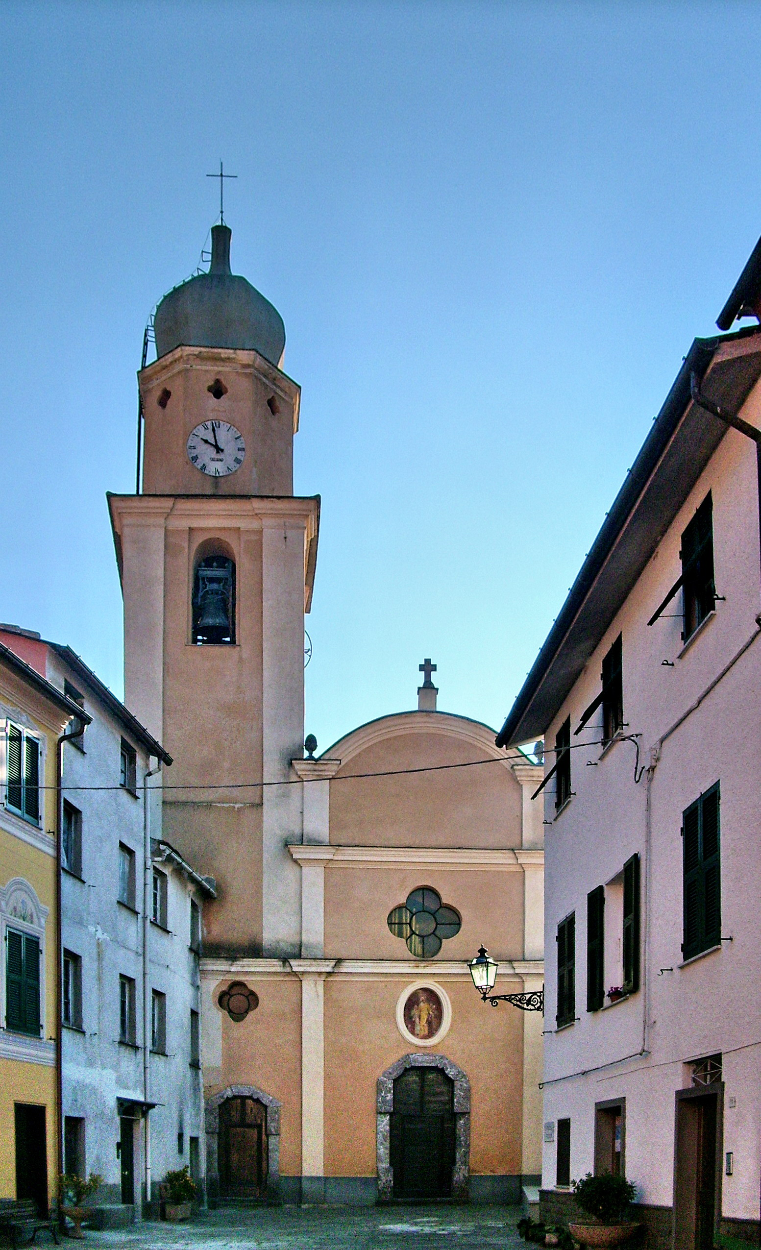 Chiesa di Santa Felicita presso Carrodano, Liguria, Italia